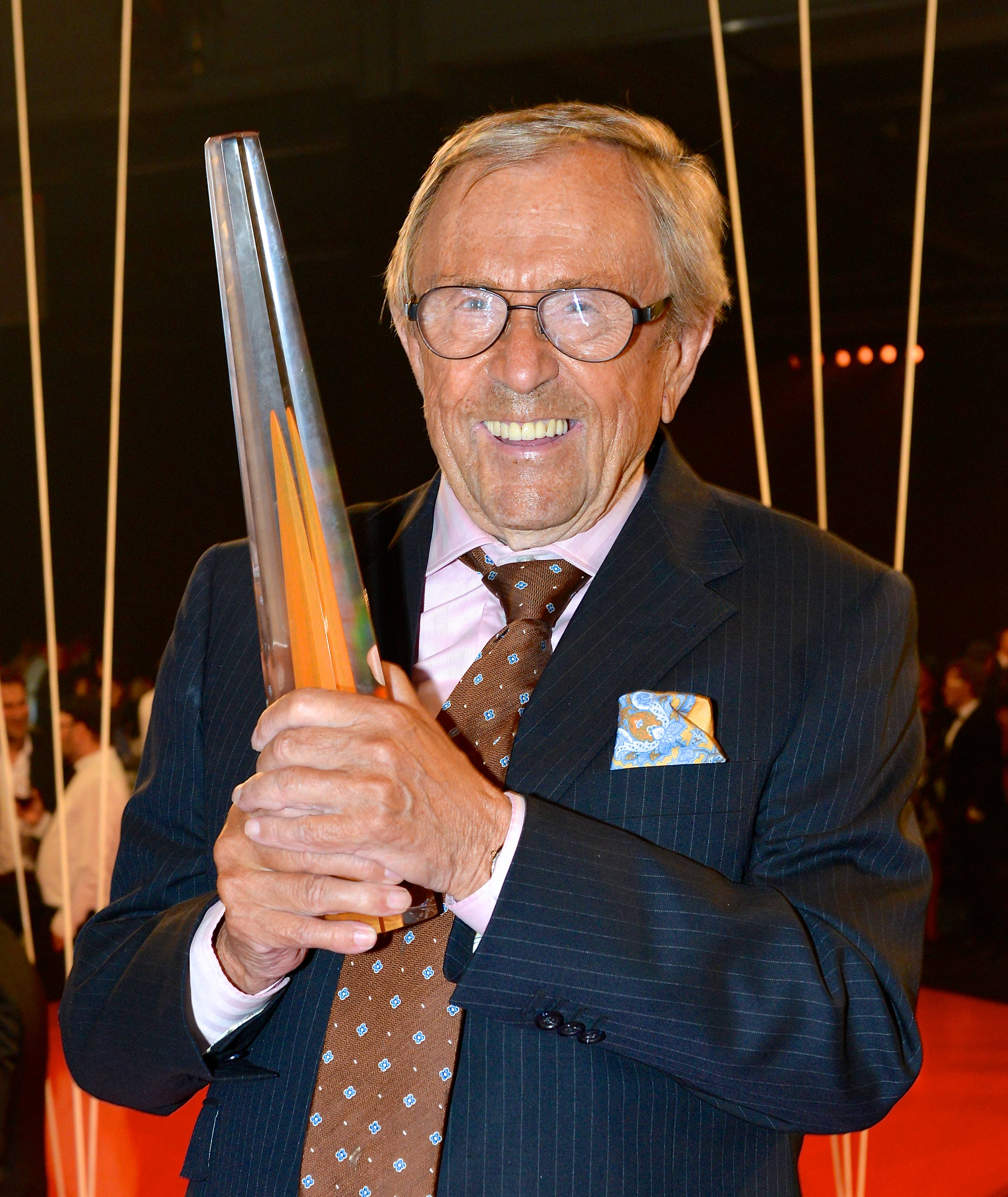 Arne Weise fick Kristallens Hederspris på Kristallengalan den 30 augusti 2013.